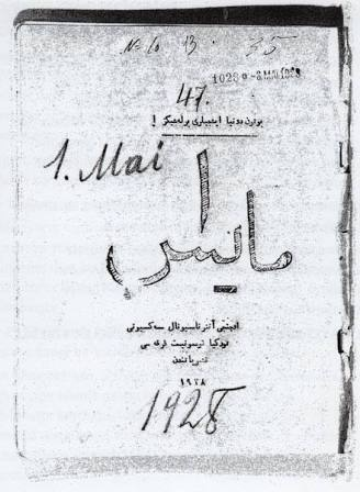 TKP tarafından 1928'de basılan 1 Mayıs bildirisi.